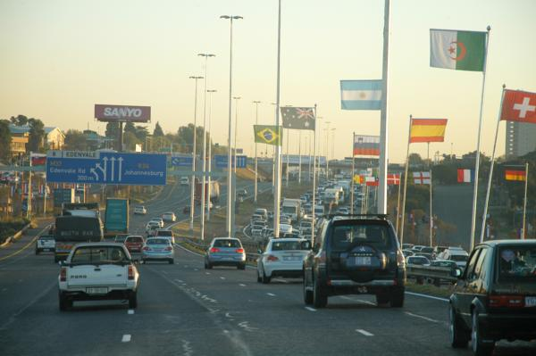 Avenidas de Johannesburg enfeitadas no clima da Copa do Mundo. Ao lado, trânsito caótico da hora do rush na cidade - Foto: Thierry Gozzer/A Gazeta - Mais informações em ht.ly/1W0OI